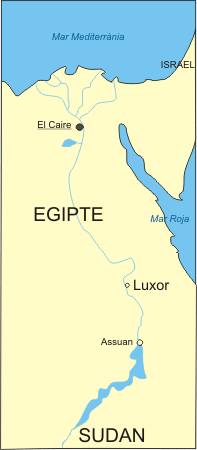 Localització de Luxor a Egipte, imatge propia